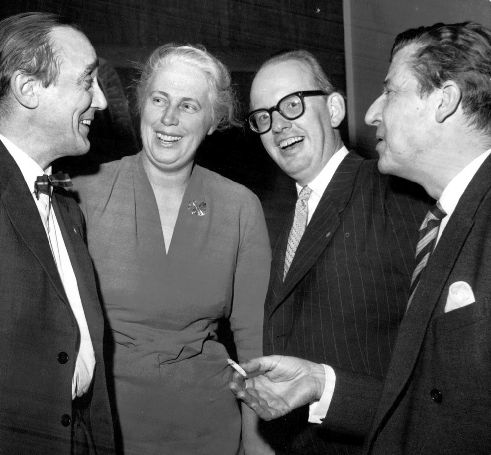 Doktor Lag Hannerz, statsrådinnan Rosa Andersson, industrikonsulent Bertil Gillqvist och direktör Göran Tamm.Karriär kan bli en dålig affär, betalas för dyrt. Det gäller att komma fram till en vettig kompromiss mellan ambition och förmåga, det blev man ganska enig om när Reklamföreningen på måndagen diskuterade "Karriären och familjen". Sedan sönderföll diskussionen långa stunder i tal om karriären för sig och familjen för sig, om barnens väl och ve och det gamla kära ämnet yrkeskvinna eller hemmakvinna.